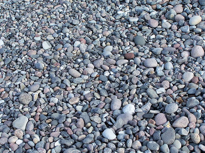 Geröllablagerungen aus Feuerstein an der Ostseeküste